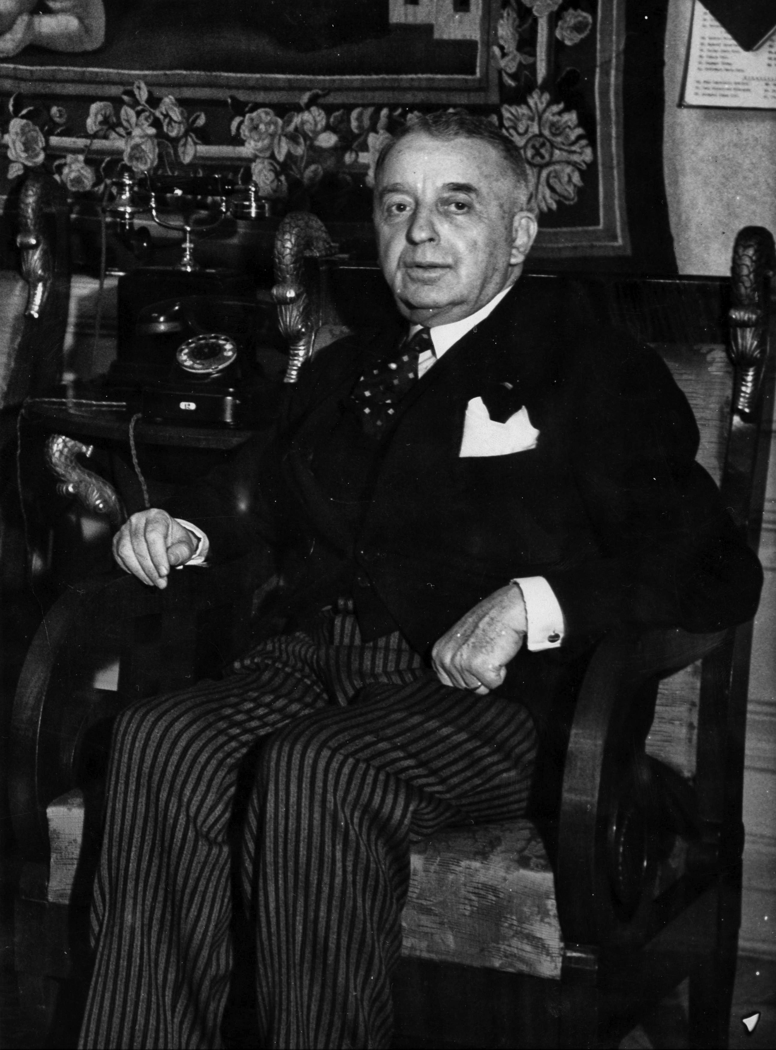 Minister spraw zagranicznych Rumunii Victor Antonescu podczas wizyty oficjalnej w Polsce.